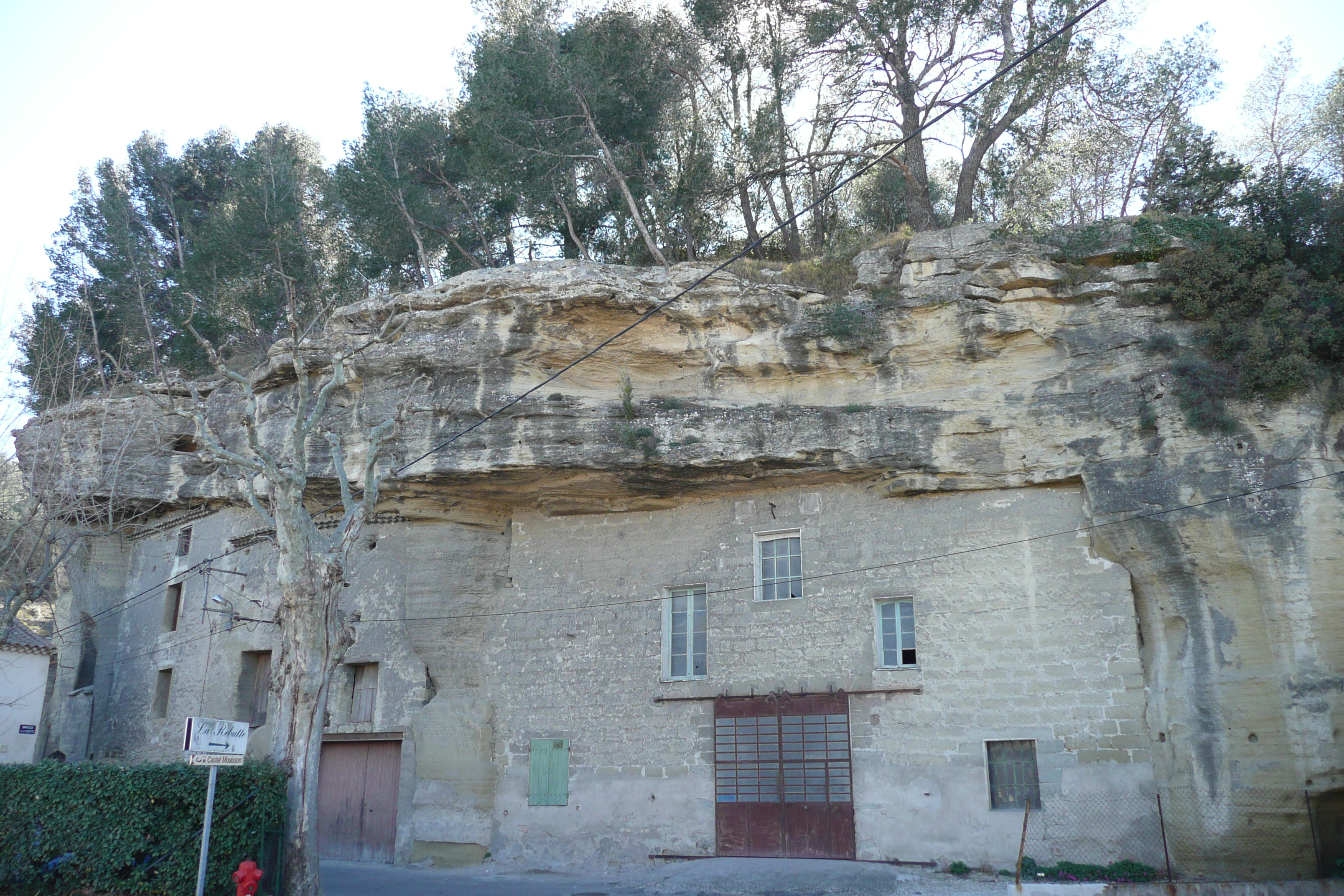 Barbentane